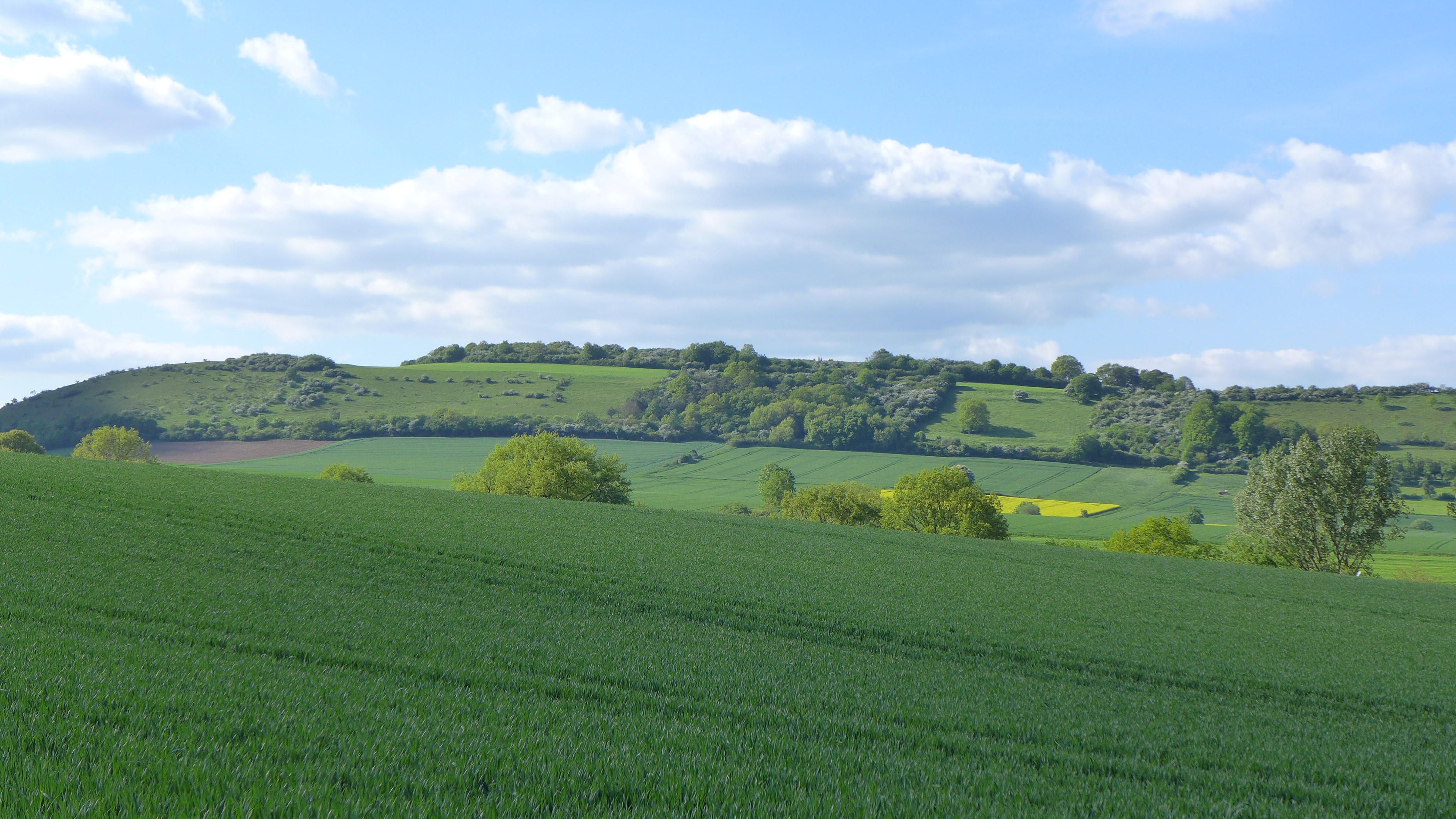 Blick aufs NSG Heukenberg in Niedersachsen